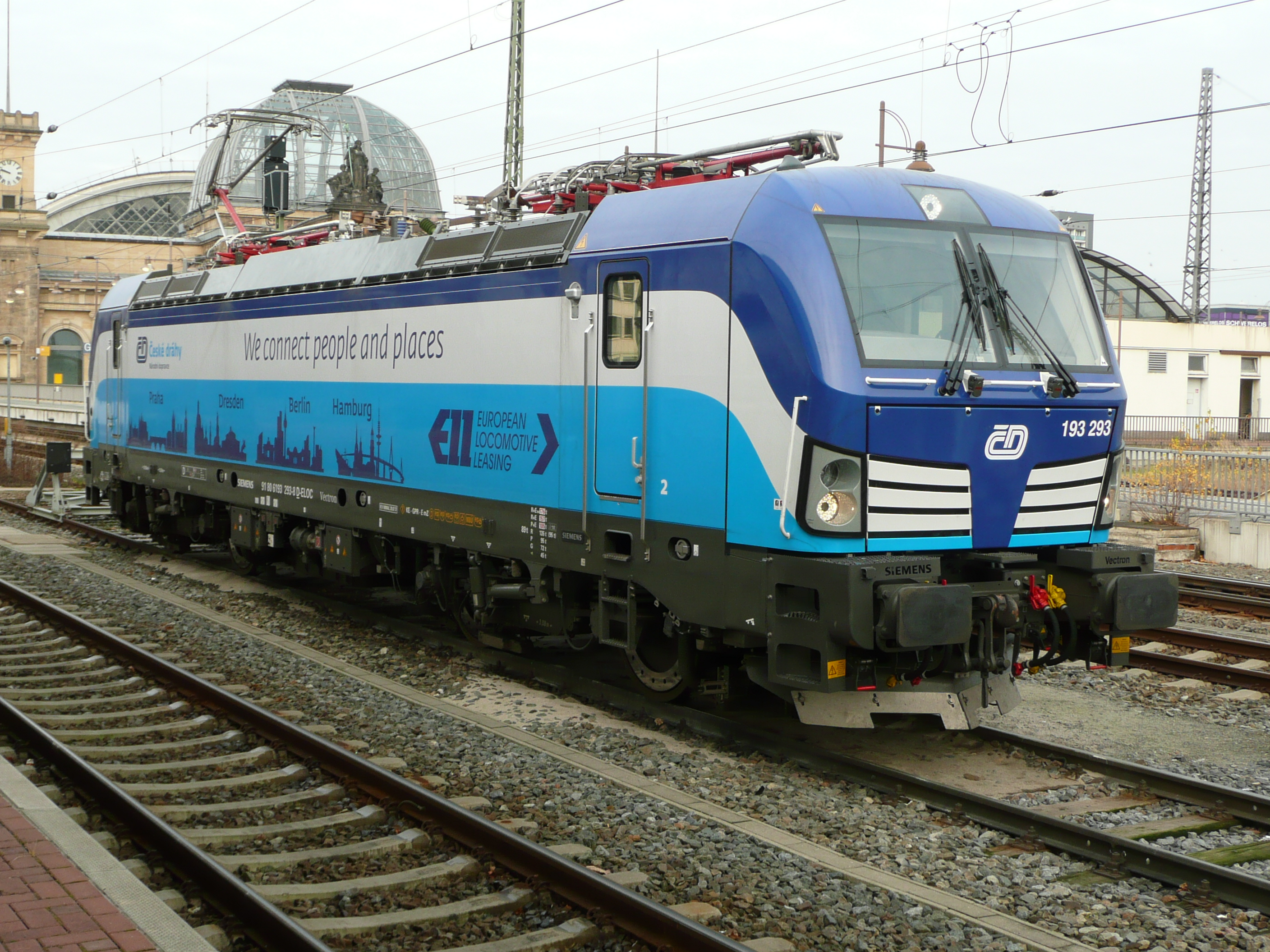 193 293 für die EC Richtung Tschechien/Slowakei/Ungarn in Dresden Hbf